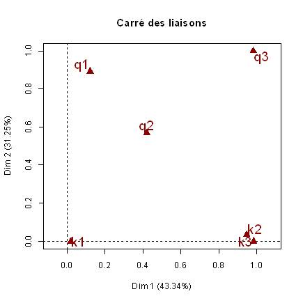 Figure2. AFDM